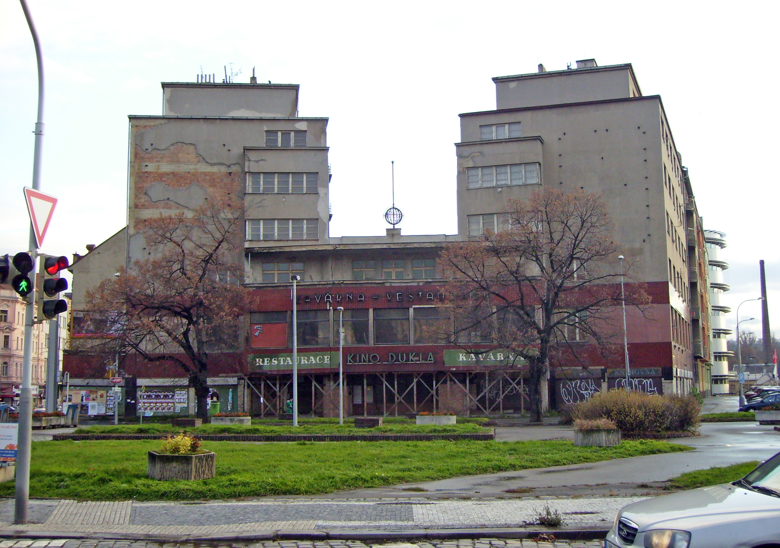 Palác Svět v Praze8-Libni